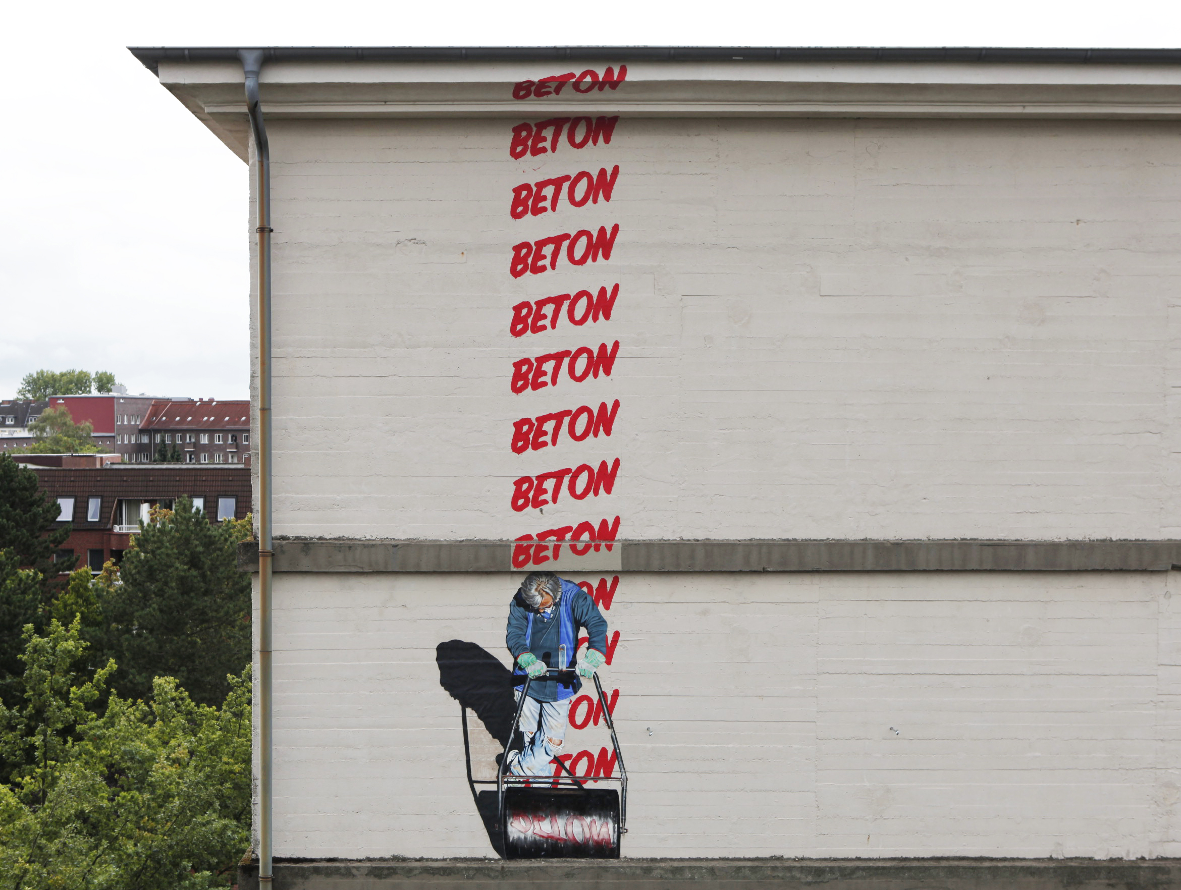 'Mörtelmaker' - Behringstraße, Hamburg, 2015